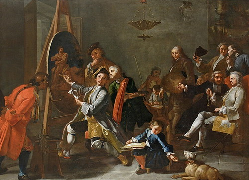 L'atelier del pittore by Giuseppe Bonito